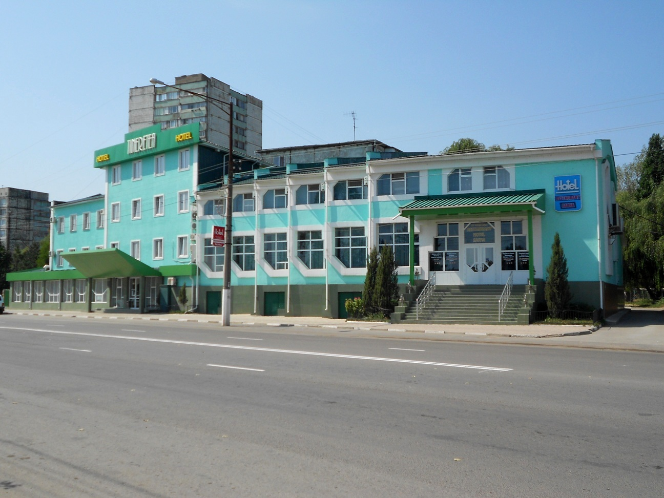 Hotel Tinerețea din Bălți